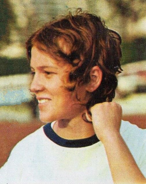 CAMPIONI dello SPORT 1973/74-Figurina n.29- ZEHRT - GERMANIA.EST-ATL.LEGGERA